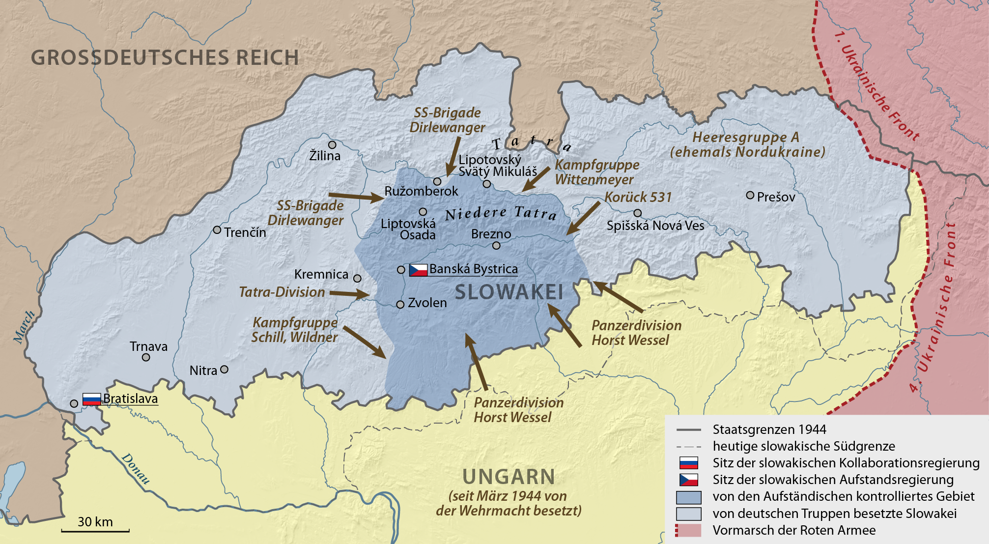 Karte zur deutschen Schlussoffensive des Slowakischen Nationalaufstands 1944